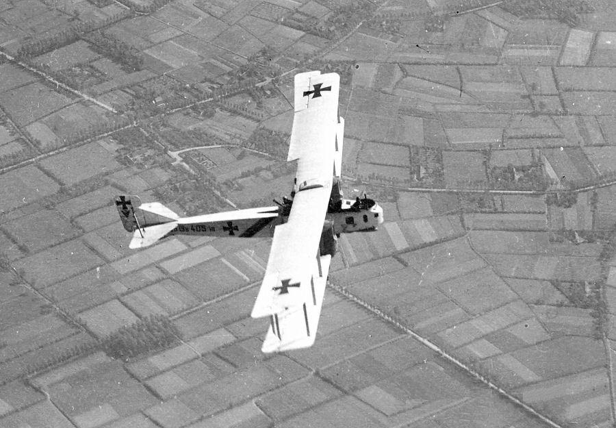 Beim Kagohl III, die Englandflieger Die Gotha GIV 405/16 im Fluge über Belgien, Oblt. von Trotha’s Flugzeug